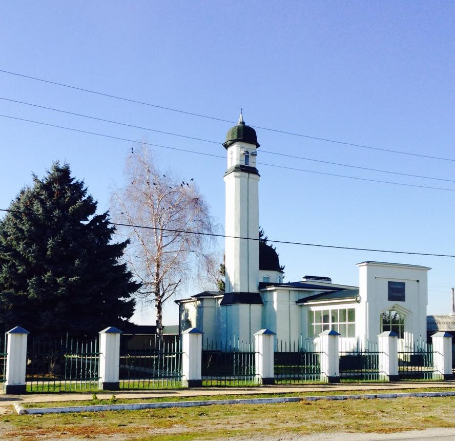 Мечеть в селе Шитхала